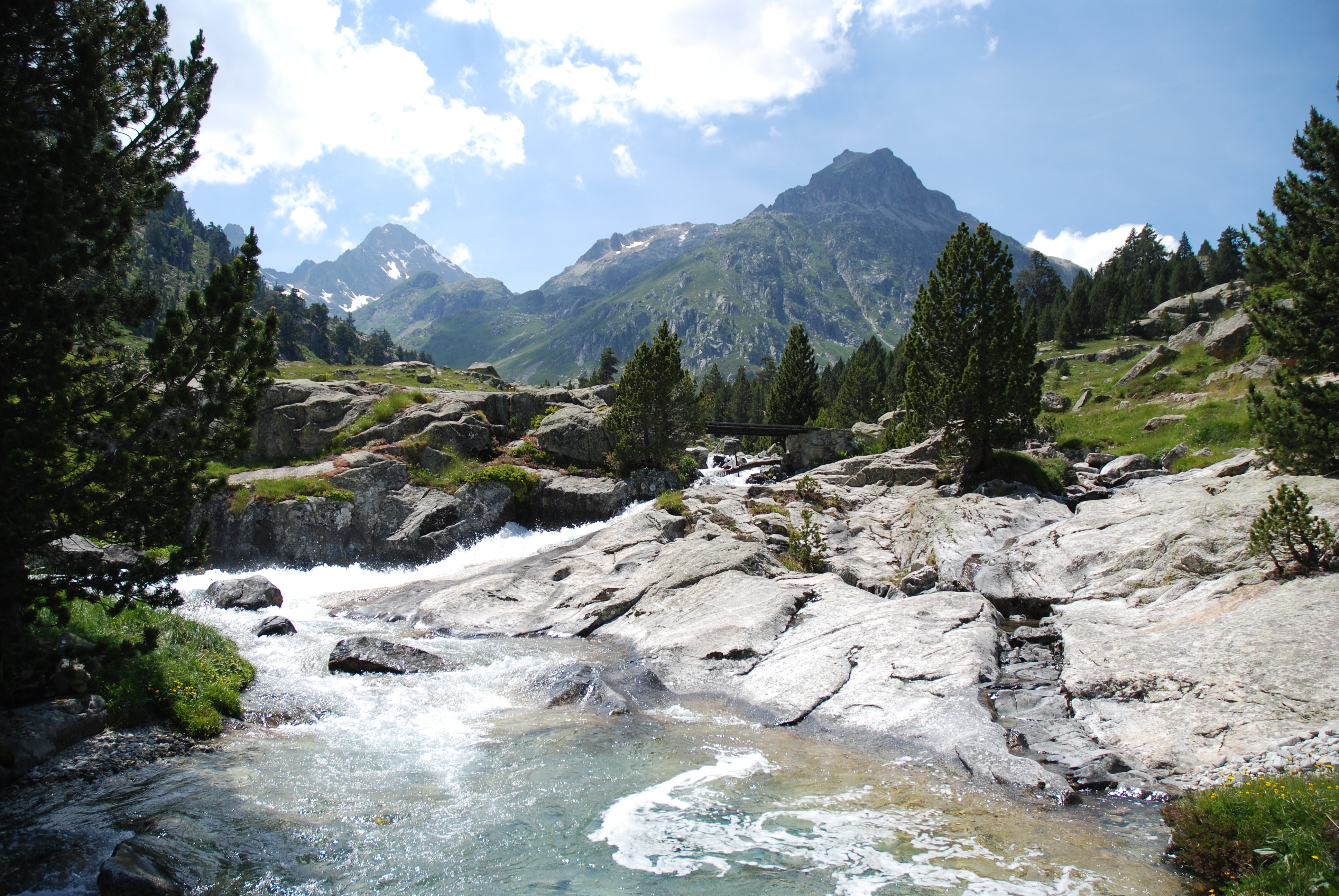 Le Pic d'Arraillous